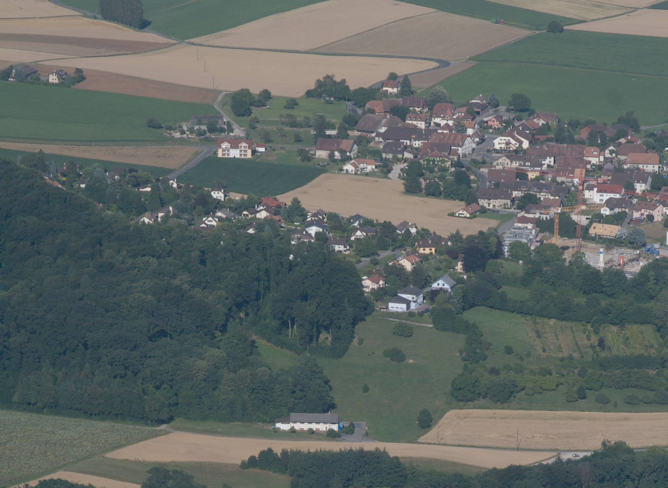 And, behind, Penthalaz.